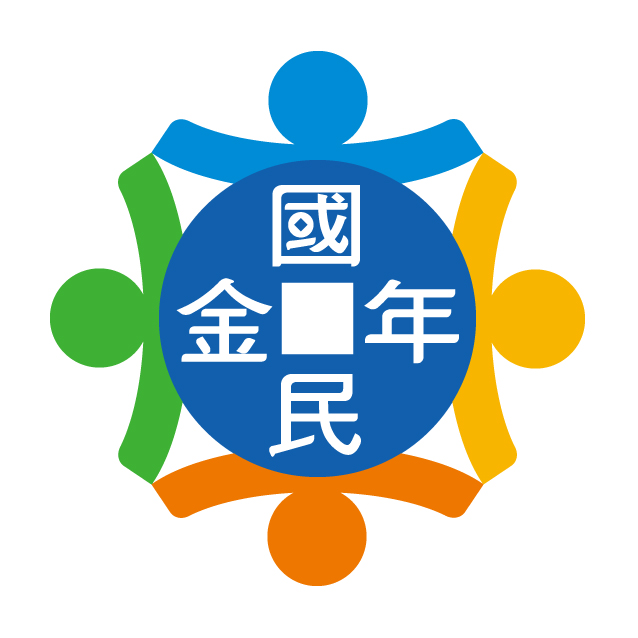 中文（台灣）: 中華民國衛生福利部國民年金標誌。